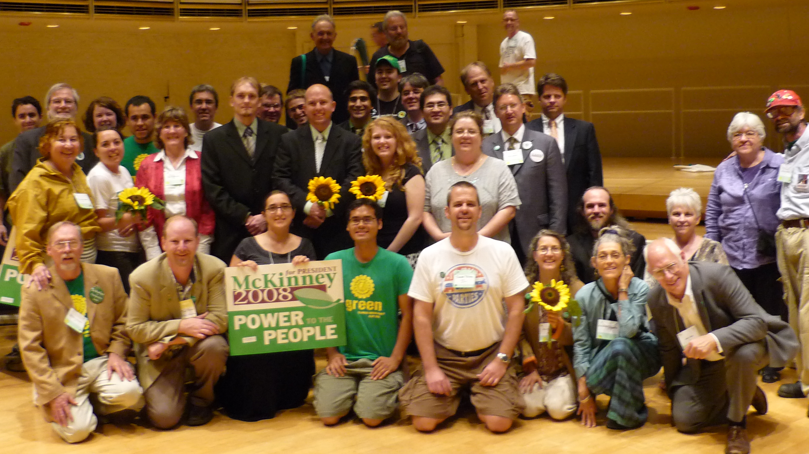 and friends